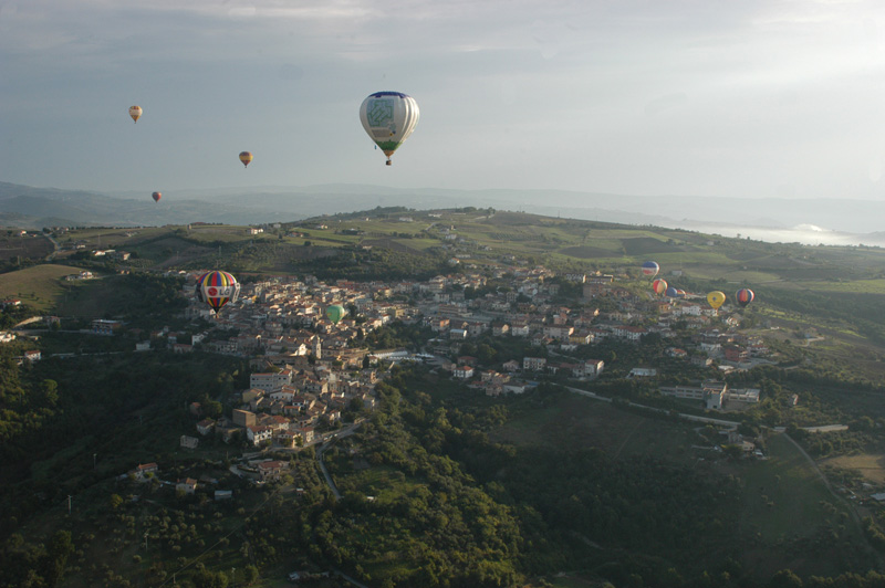 hot air balloons meeting at fragneto monforte